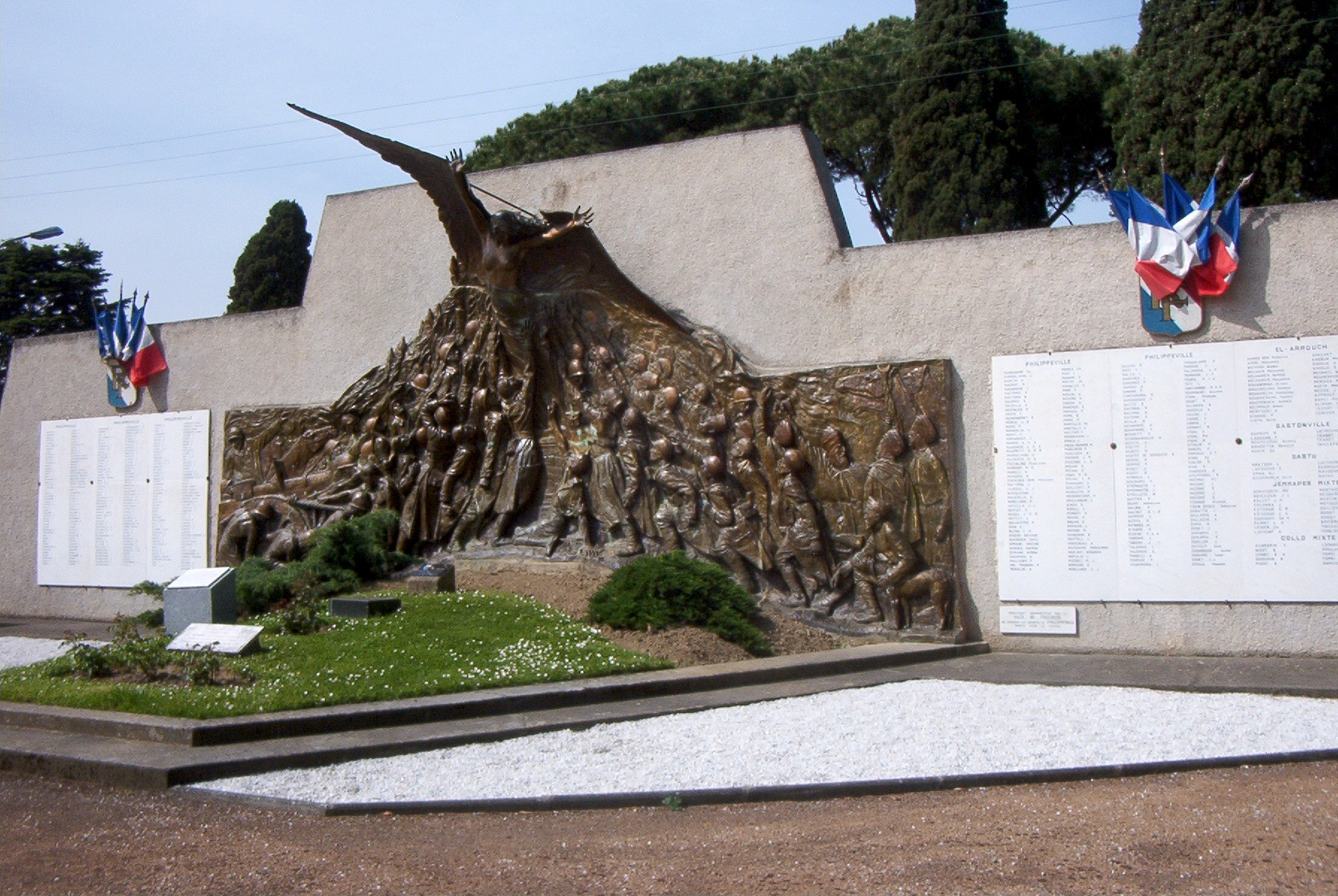 Oeuvre de Camille Alaphilippe. Monument aux morts de Philippeville (Skikda) transféré en 1969 à Toulouse.